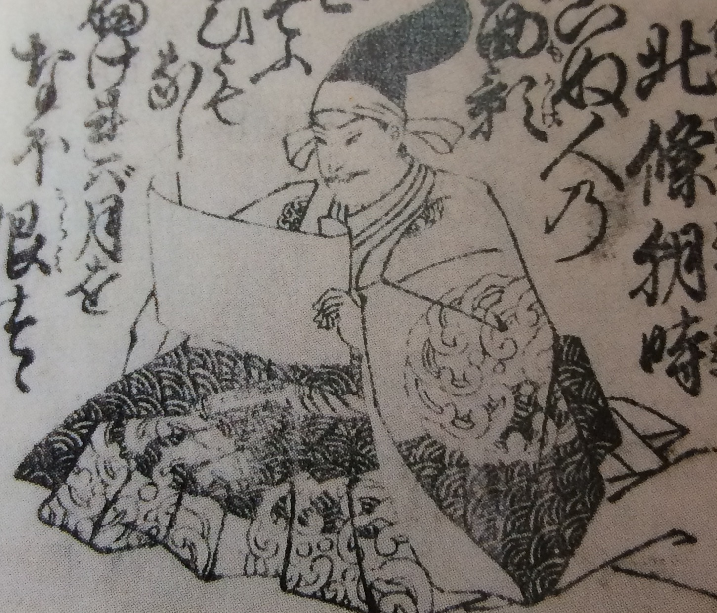 義烈百人一首より北条朝時像 国文学研究資料館蔵